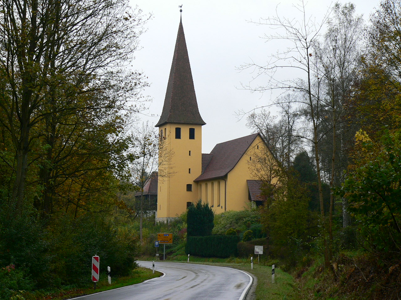 Evang.-Luth. Joachim-von-Ortenburg-Kirche in Weitramsdorf-Tambach bei Coburg, Bayern